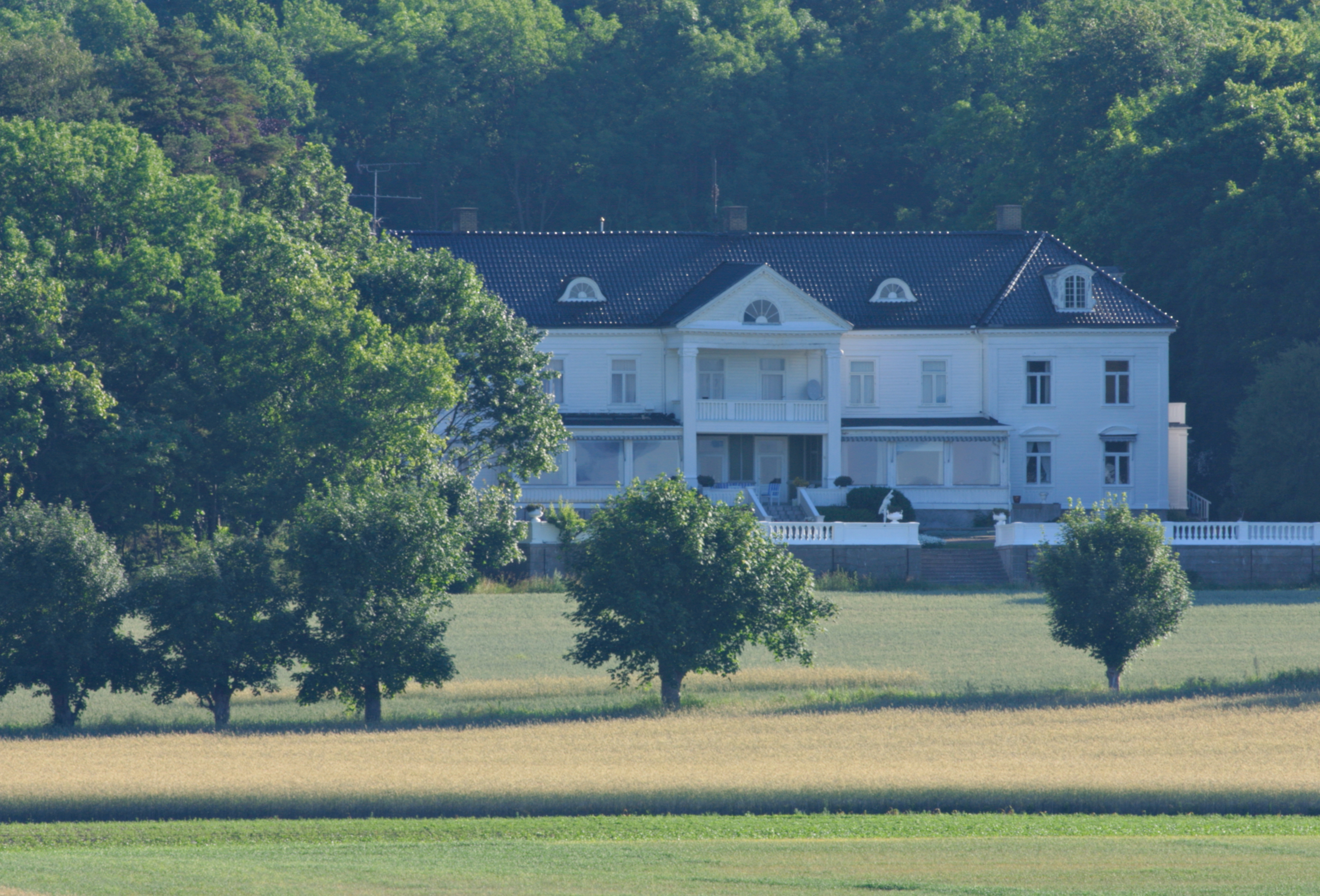 Den storslagne hovedbygningen på Reier gård på Jeløy, øst for Alby. Dette er en av de største historiske trebygningene i Østfold.